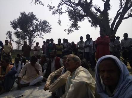 सेमरा, गाज़ीपुर गाँव के लोग गंगा कटान से बचाव के लिए बैठक करते हुए.